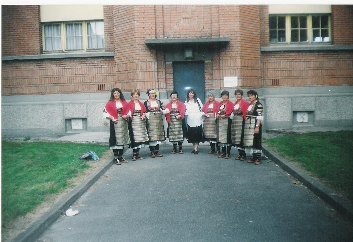 Калищенските баби в Париж малко преди самостоятелния си концерт концерт.